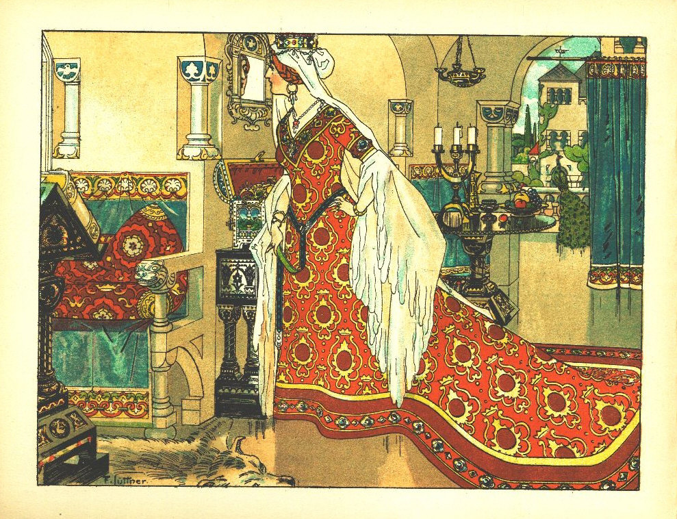 Illustration from Sneewittchen, Scholz' Künstler-Bilderbücher, Mainz